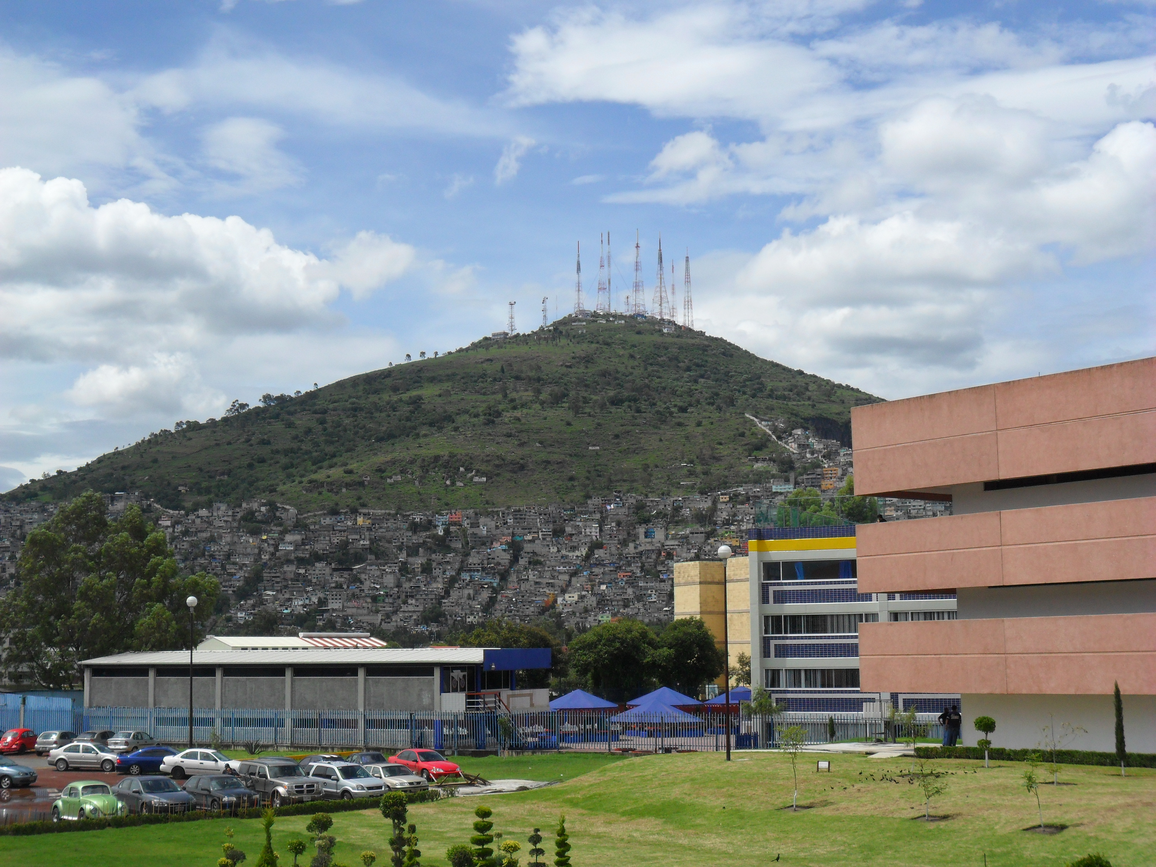 Cerro del Chiquihuite, DF, Mexico